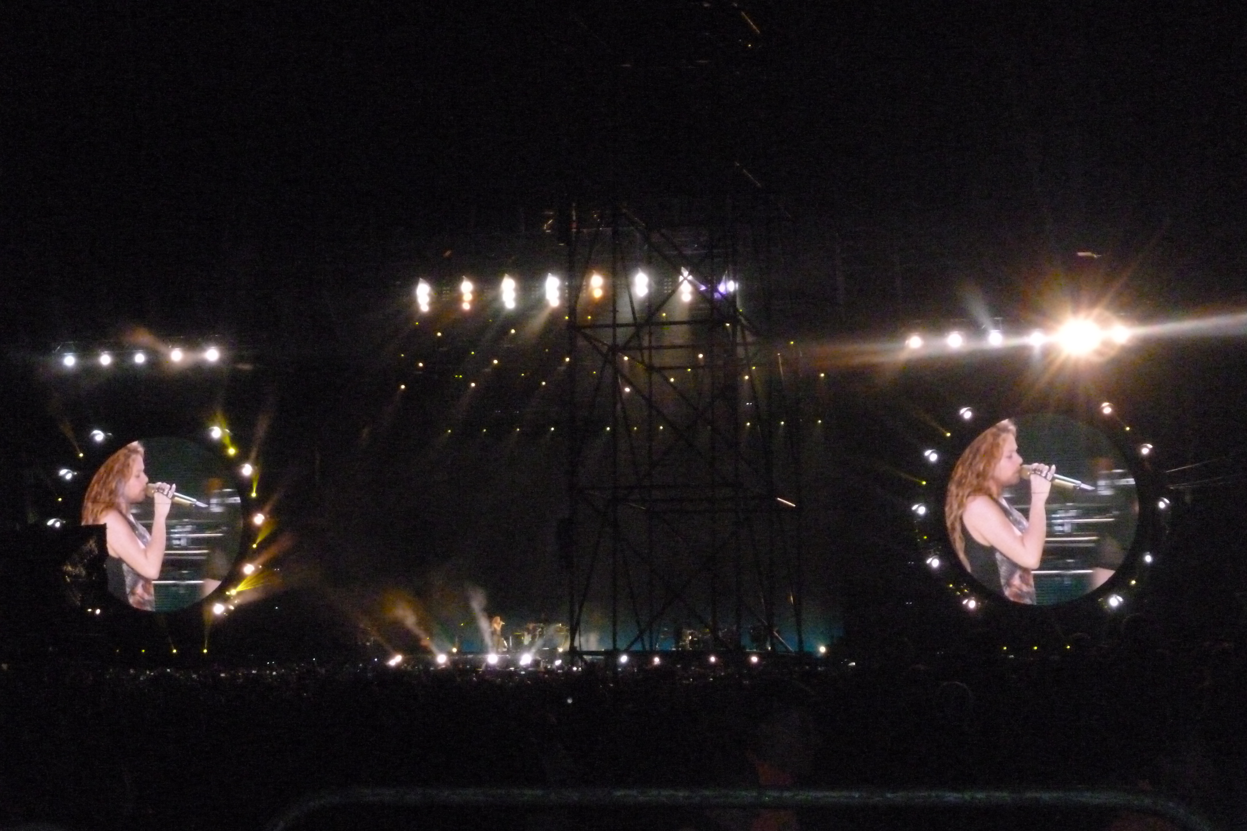 Shakira durante el ultimo show de su tour El Dorado World Tour en Bogotá Colombia